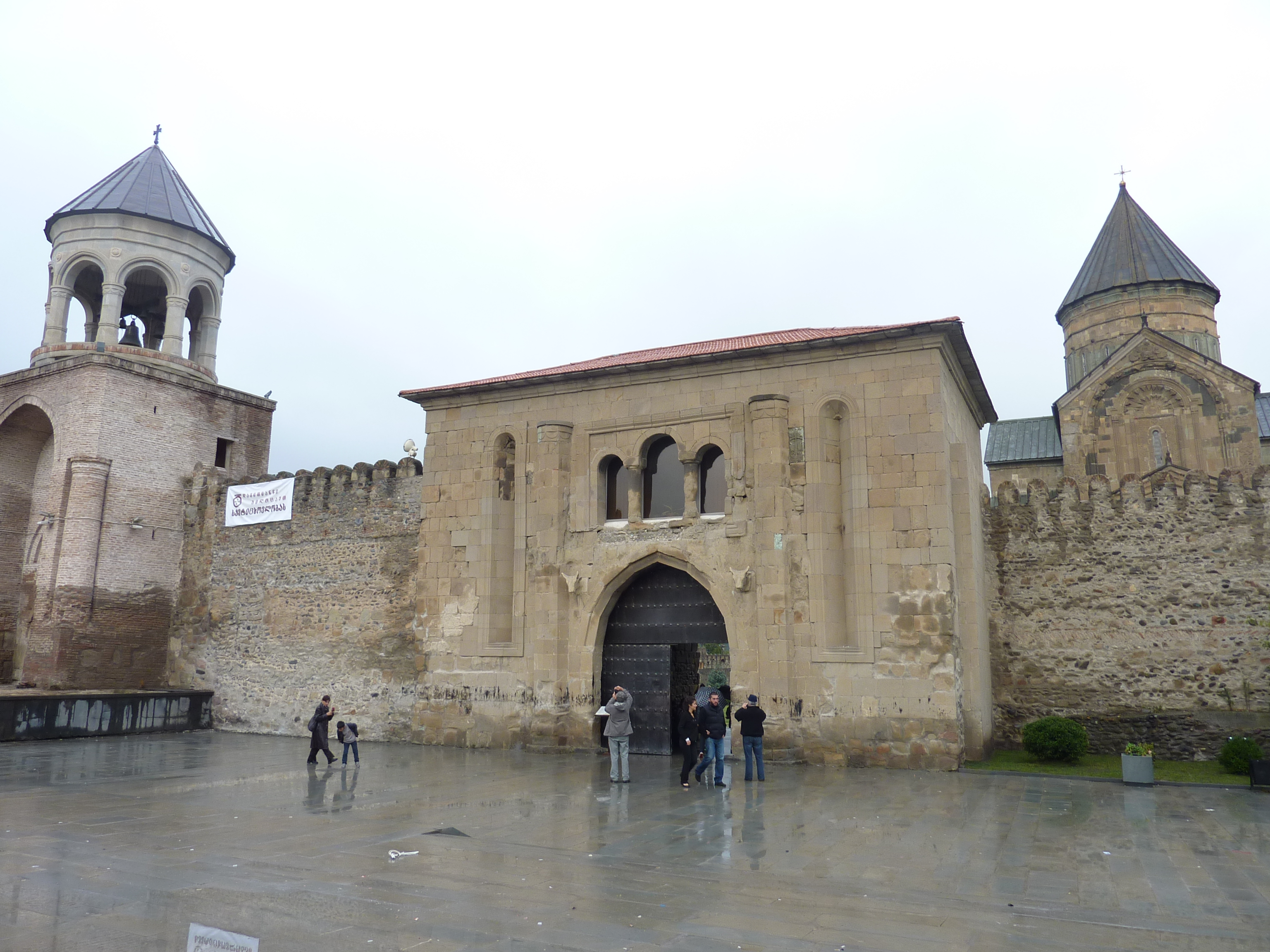 Cathédrale de Mtshéta Portail d'entrée de l'enclos ceinturant la cathédrale